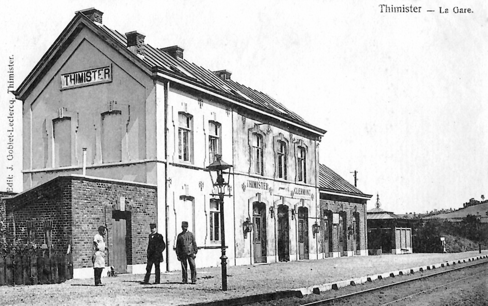 Le bâtiment de la gare de Thimister à Timister-Clermont, sur la ligne 28 en Belgique.